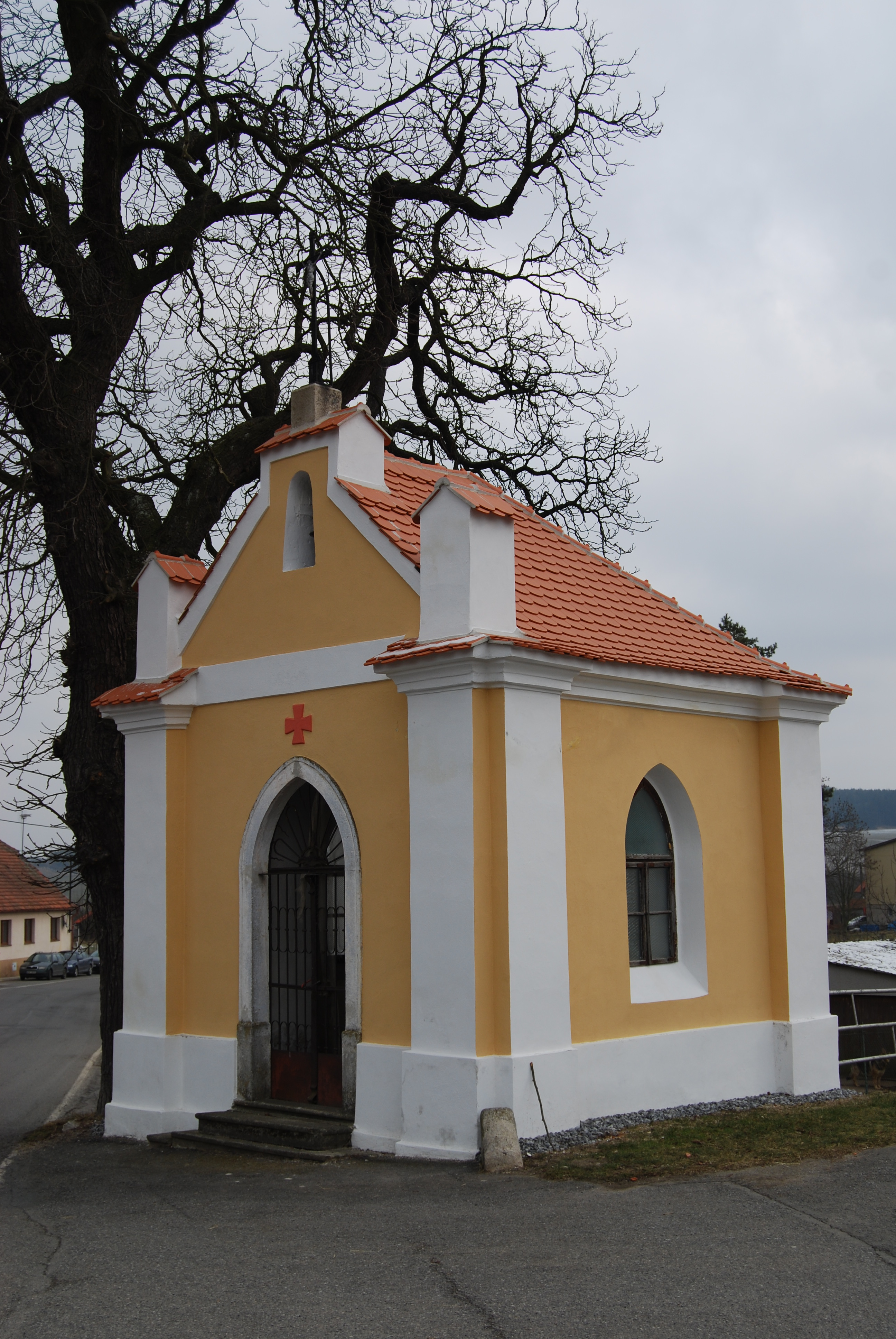 Kaple sv. Václava z druhé poloviny 19. století v obci. Osek. Okres Strakonice. Česká republika.